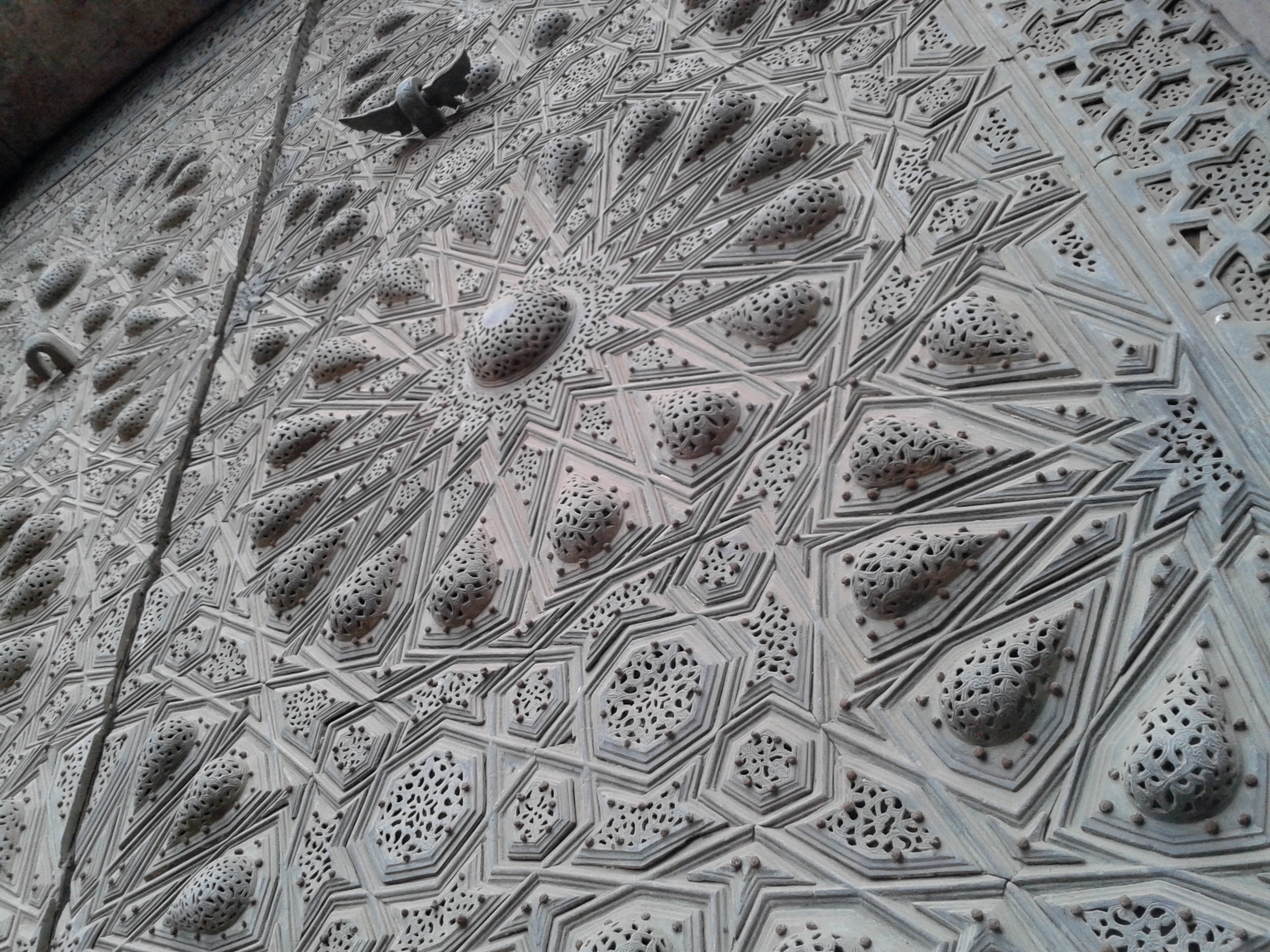 بوابة مسجد المؤيد شيخ بشارع المعز لدين الله الفاطمي